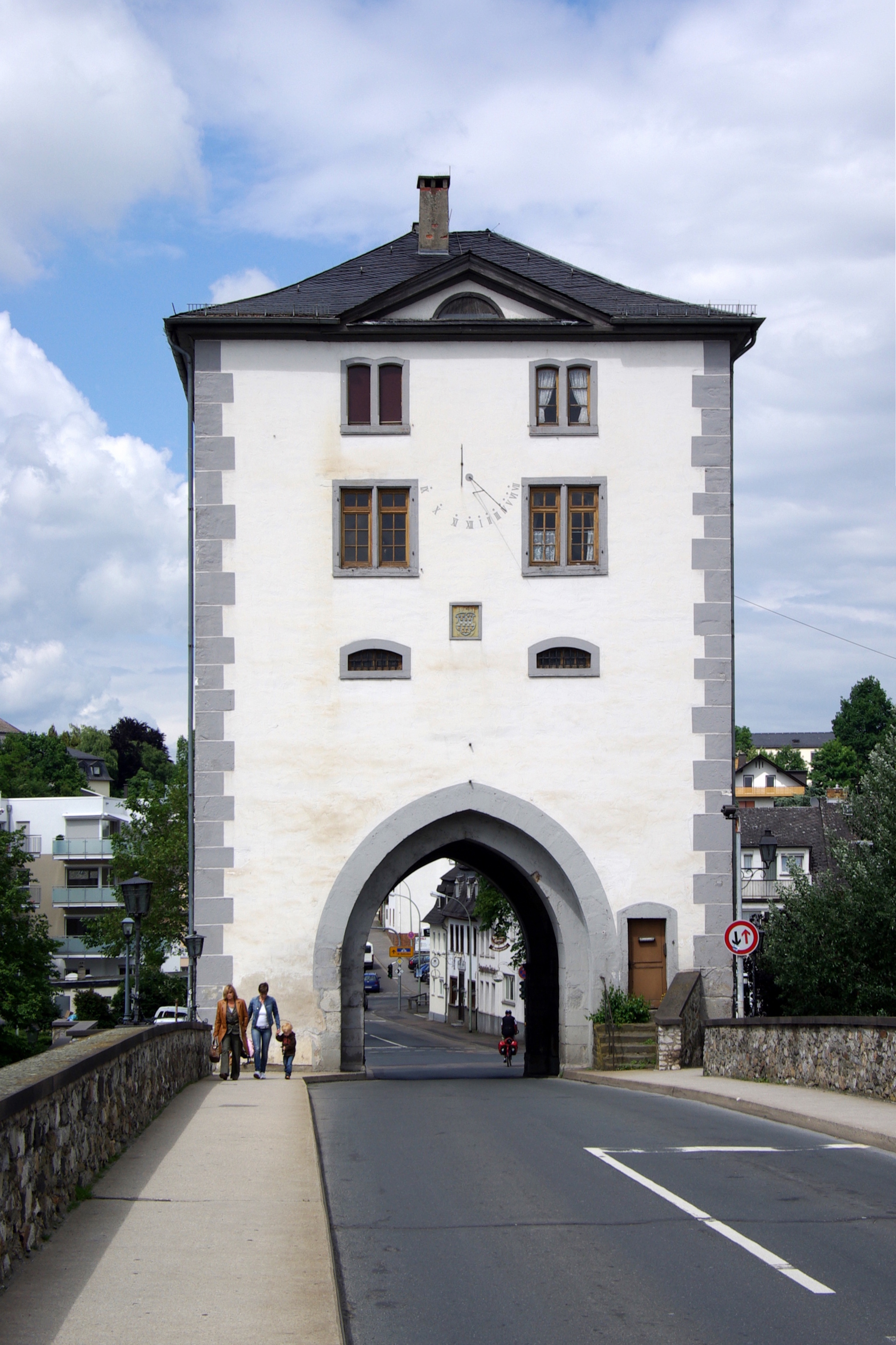 Limburg an der Lahn, Brückentor